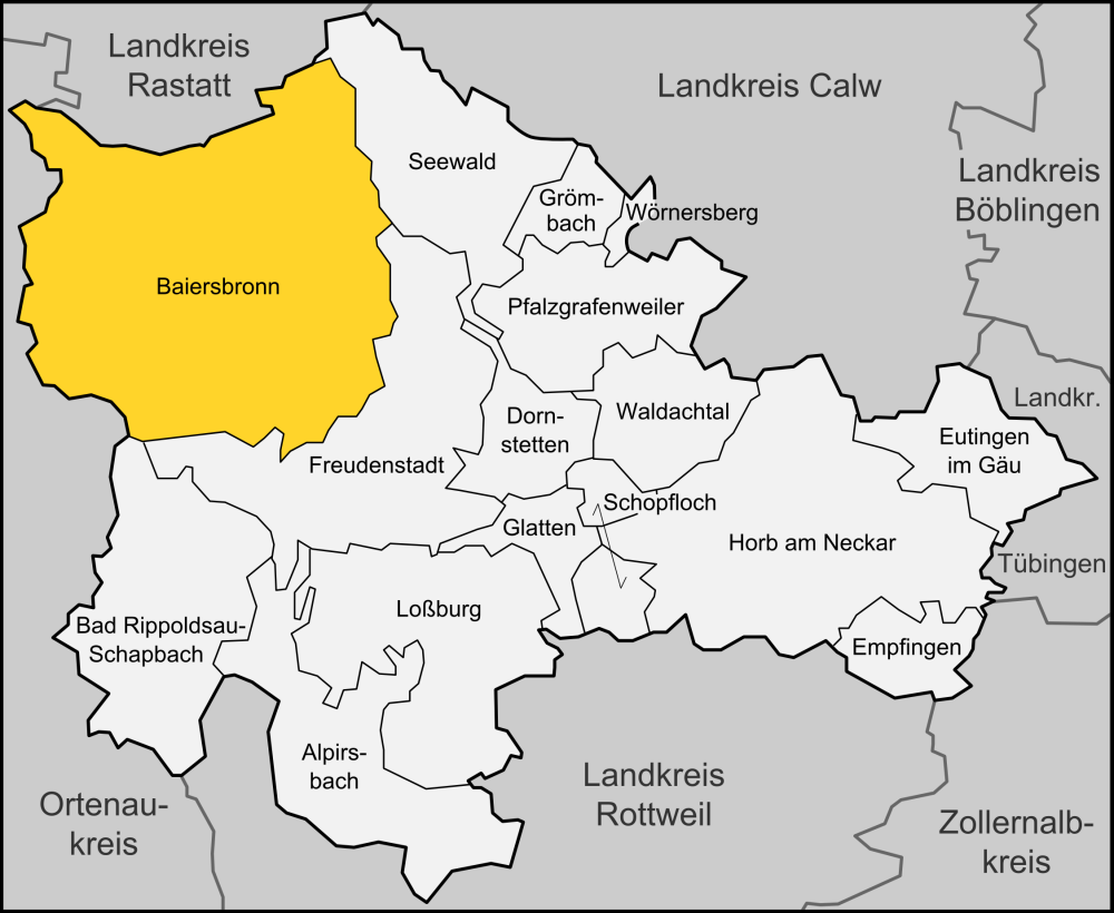 Karte der Gemeinde Baiersbronn im Landkreises Freudenstadt